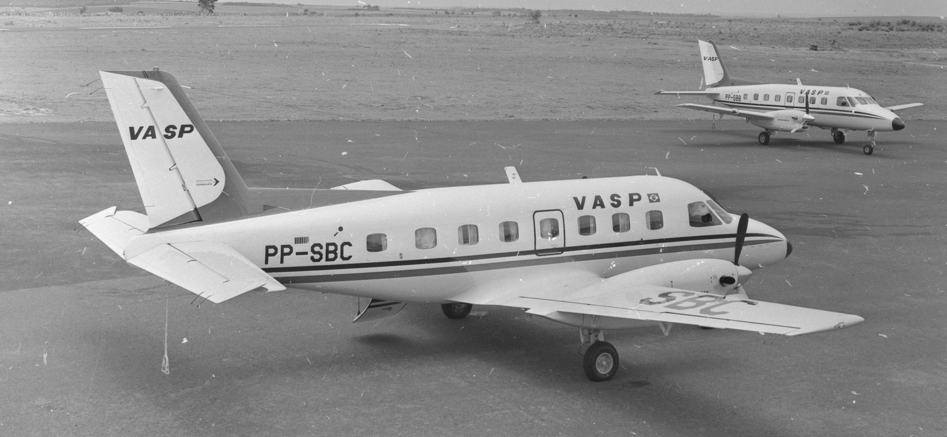 As aeronaves Embraer 110-Bandeirante PP-SBB e SBC da Vasp estacionadas em um aeroporto do interior paulista. Imagem do Acervo iconográfico do Arquivo Público do Estado de São Paulo, código BR APESP SEGOV ICO NEG 5735 01.